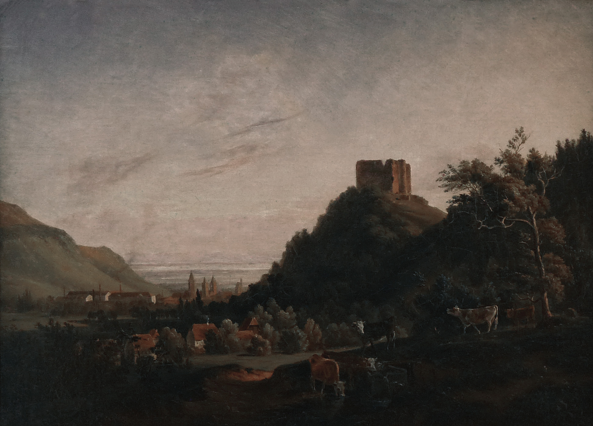 Léon Berthoud (1822-1892), Guebwiller avec le Hugstein, s. d., huile sur toile, Musée des beaux-arts de Strasbourg.